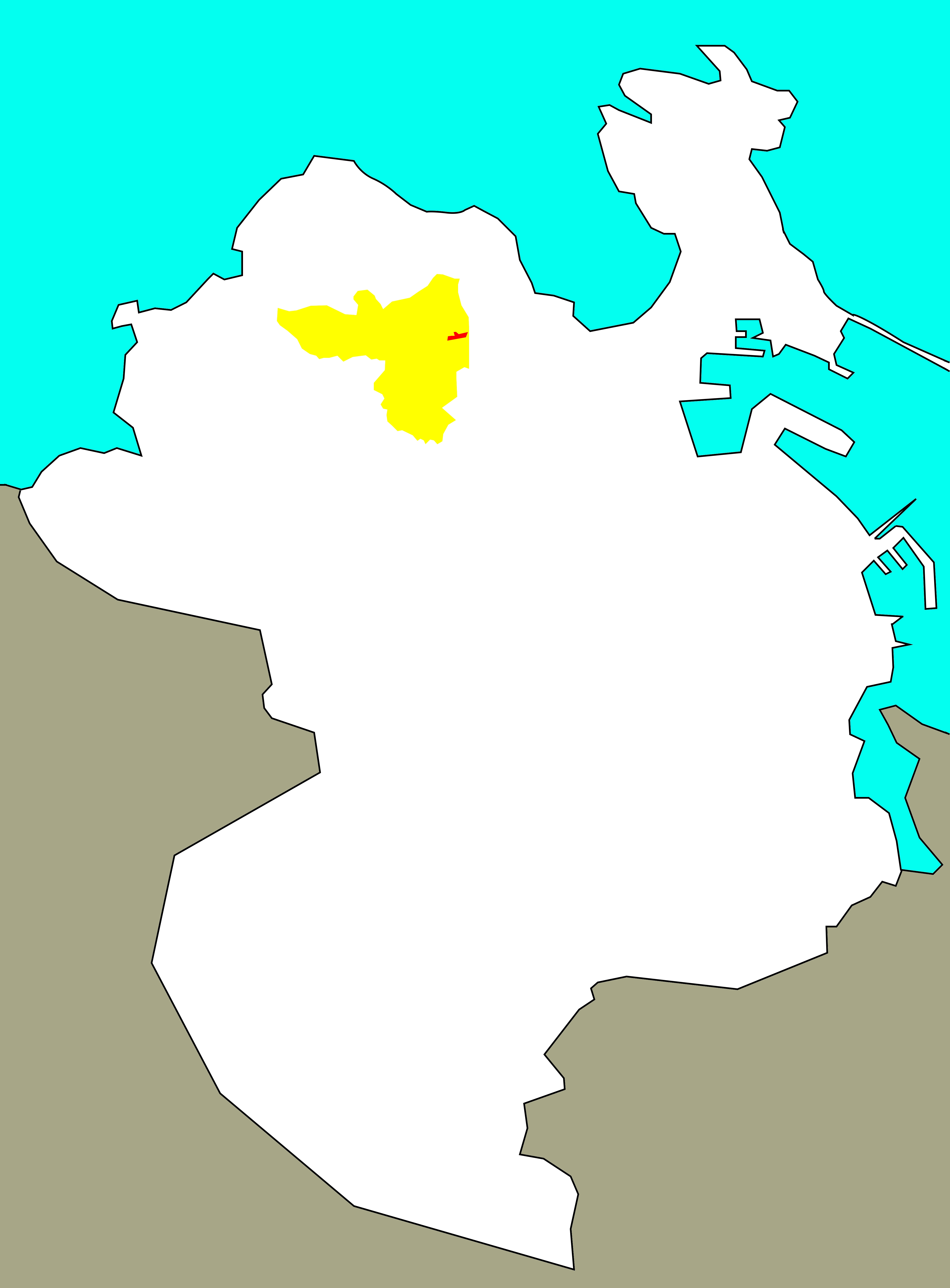 Situación de Pardiñas no "barrio-territorio" de San Pedro de Visma.[1]